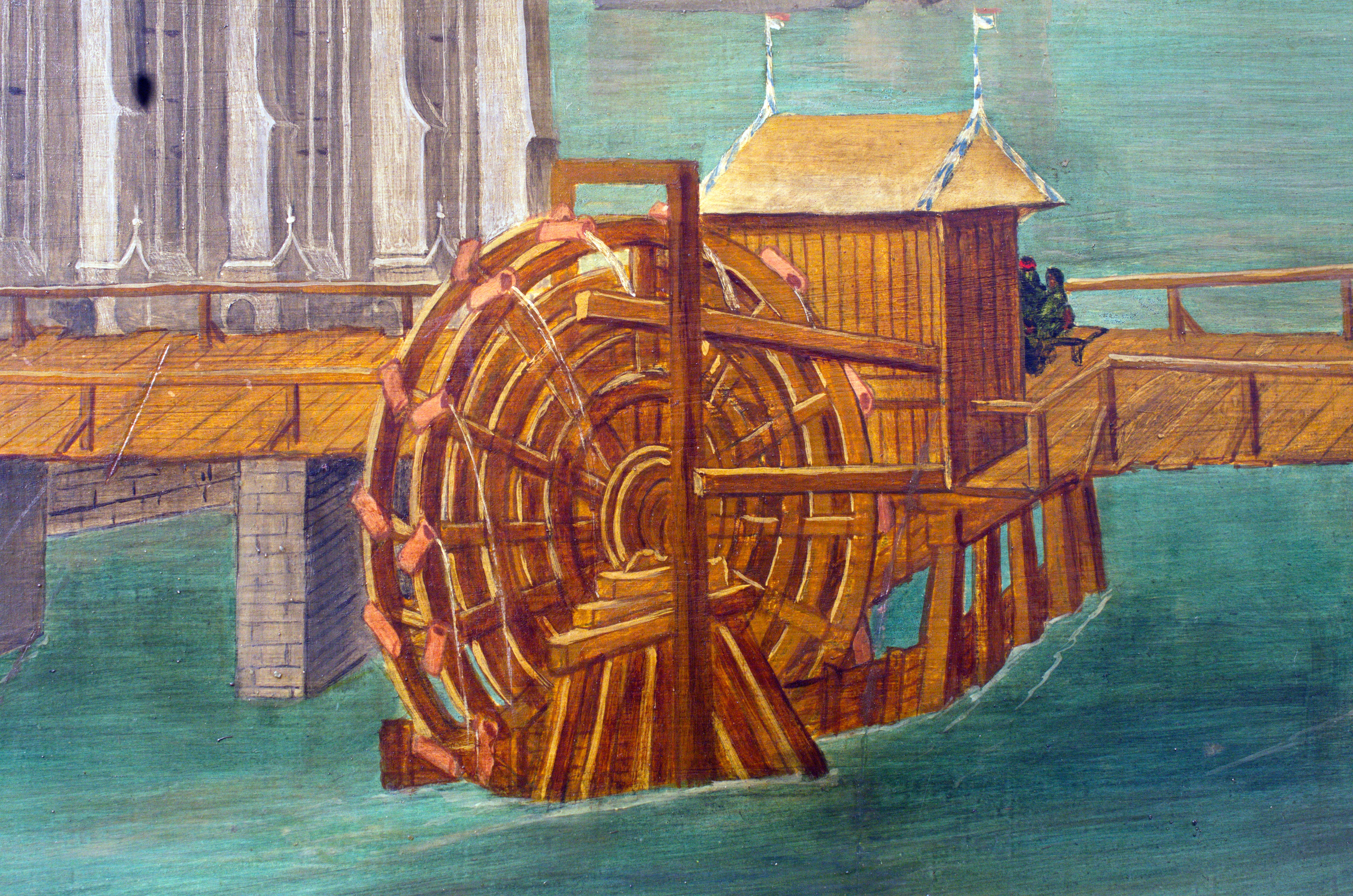 Die Wasserkirche ihre Wassermühle auf der Replik der Altartafeln von Hans Leu im Baugeschichtlichen Archiv der Stadt Zürich im Haus zum Rech. Die Panoramansicht des linksseitigen Limmatufers – 'Standort' der BetrachterIn ist wohl der Karlsturm des Grossmünsters – von Hans Leu d. Ä. gilt als die älteste zuverlässige Darstellung der Stadt Zürich, Ende des 15. Jahrhunderts auf den Altartafeln im Grossmünster mit viel Liebe zum Detail festgehalten. Die originalen Tafeln sind heute im Landesmuseum ausgestellt, eine (vermutlich) 1:1 Replik ist im Stadtarchiv öffentlich zugänglich.